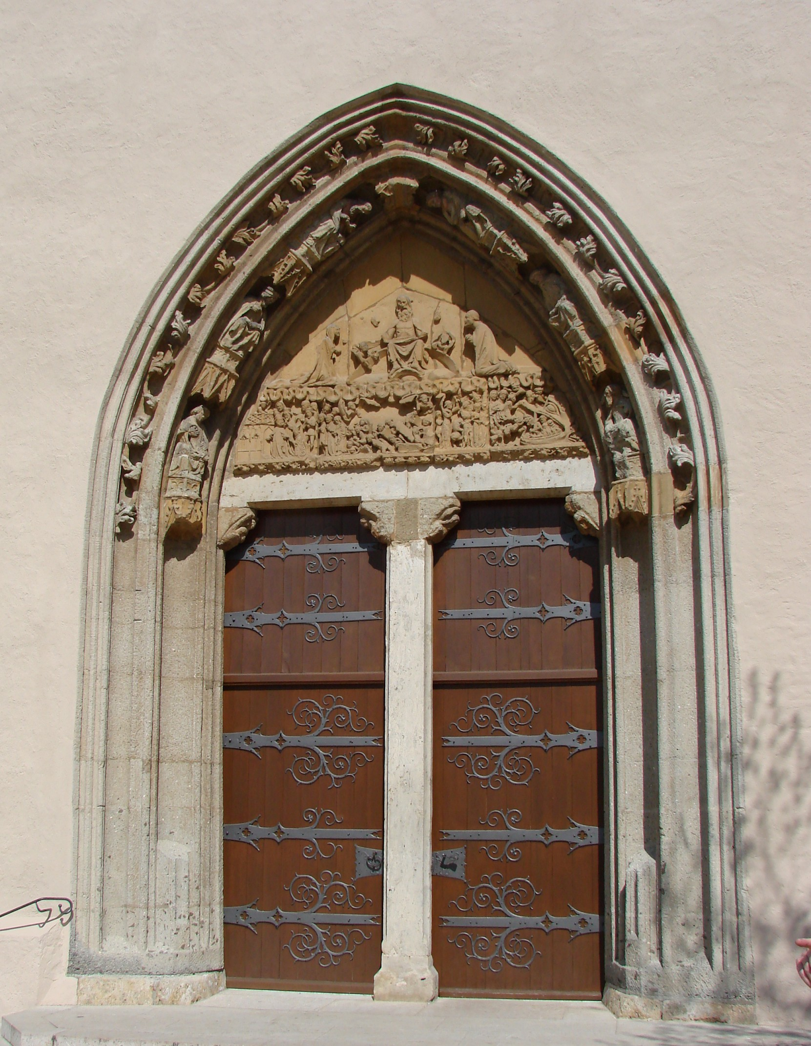 Nördlingen, Germany, Salvator church, portal